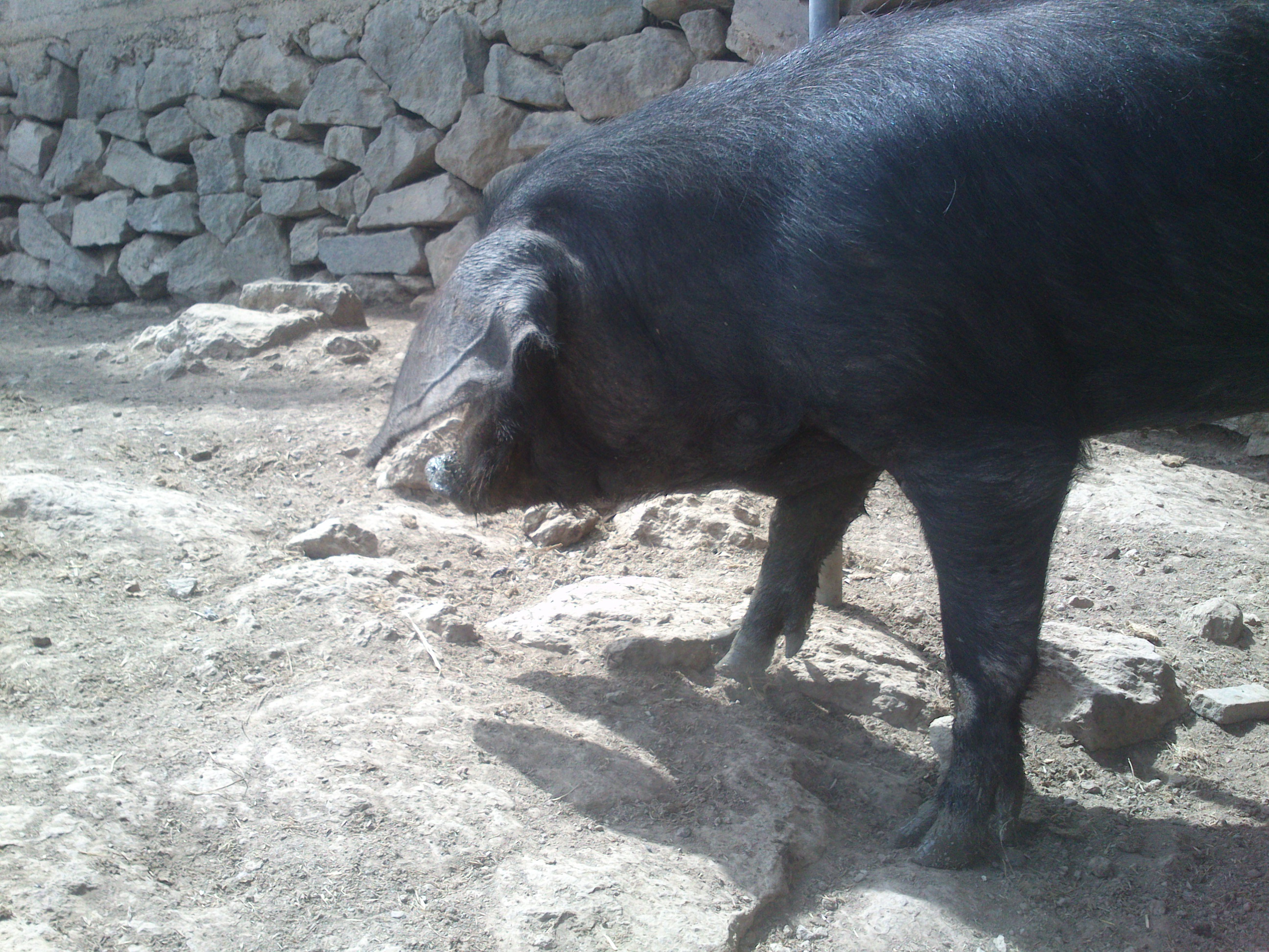 Granja Arucone